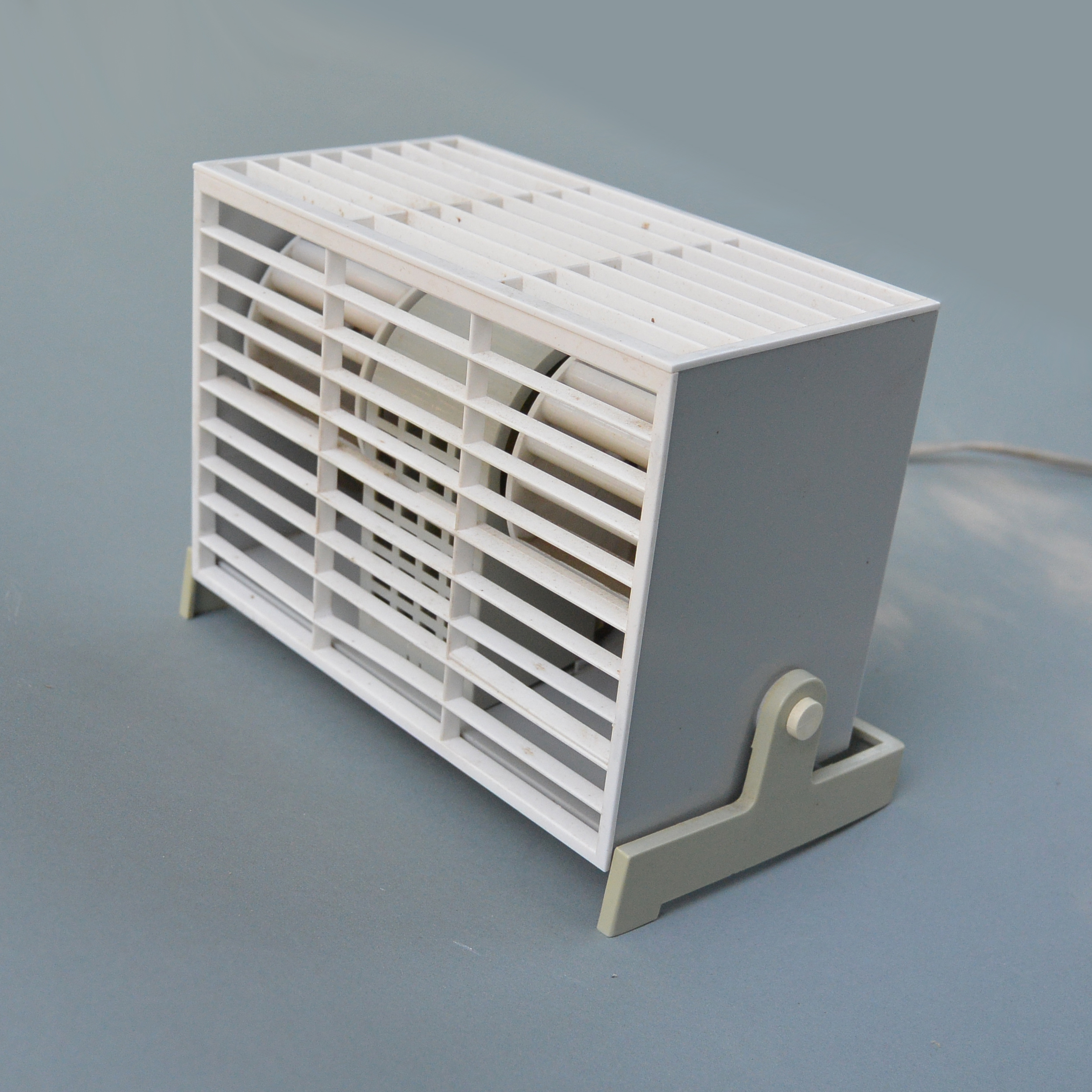 Heizlüfter Thermodym T3